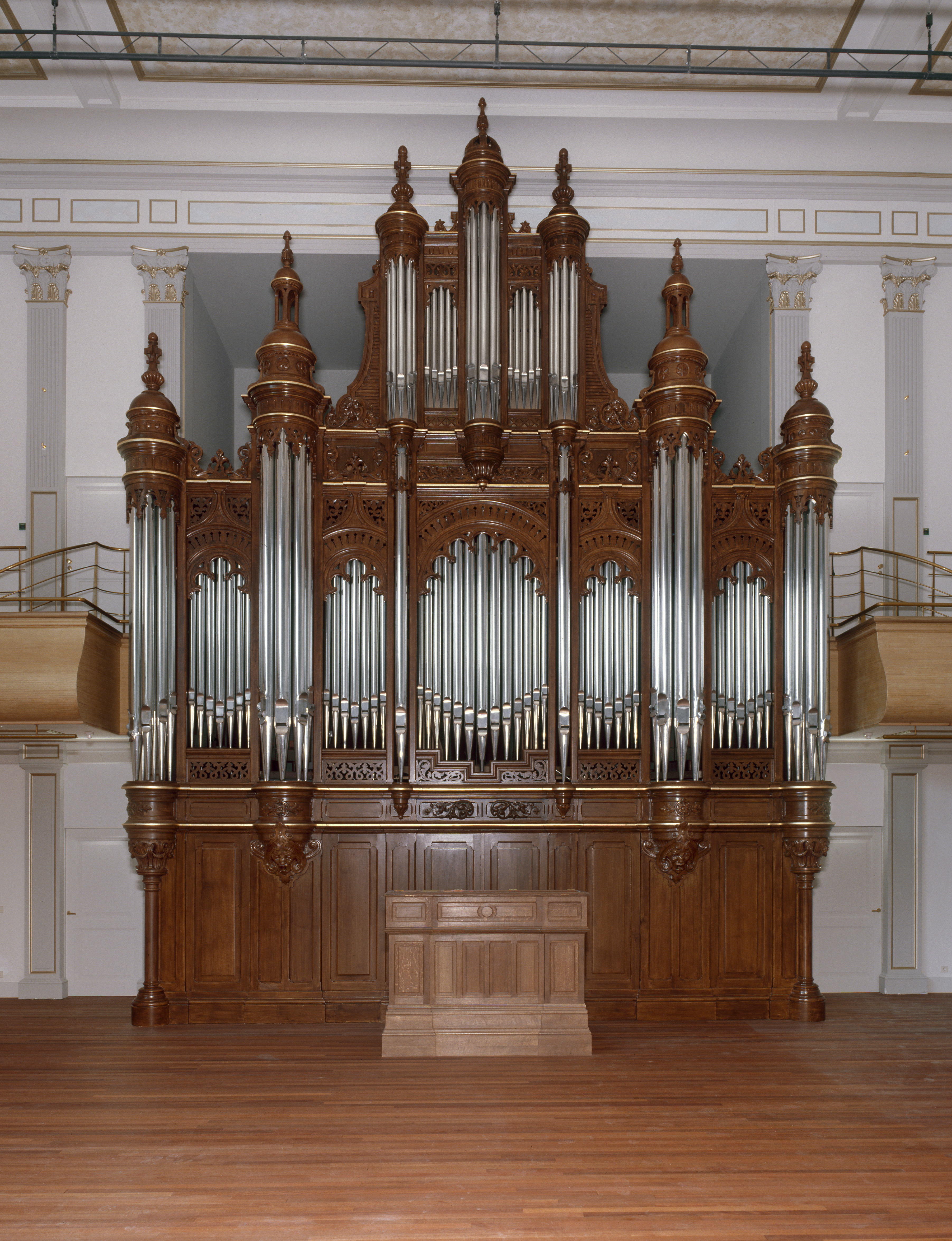 De Philharmonie: Intenieur, aanzicht orgel (opmerking: Gefotografeerd voor Het Historische Orgel in Nederland 1872-1878, bladzijde 190)